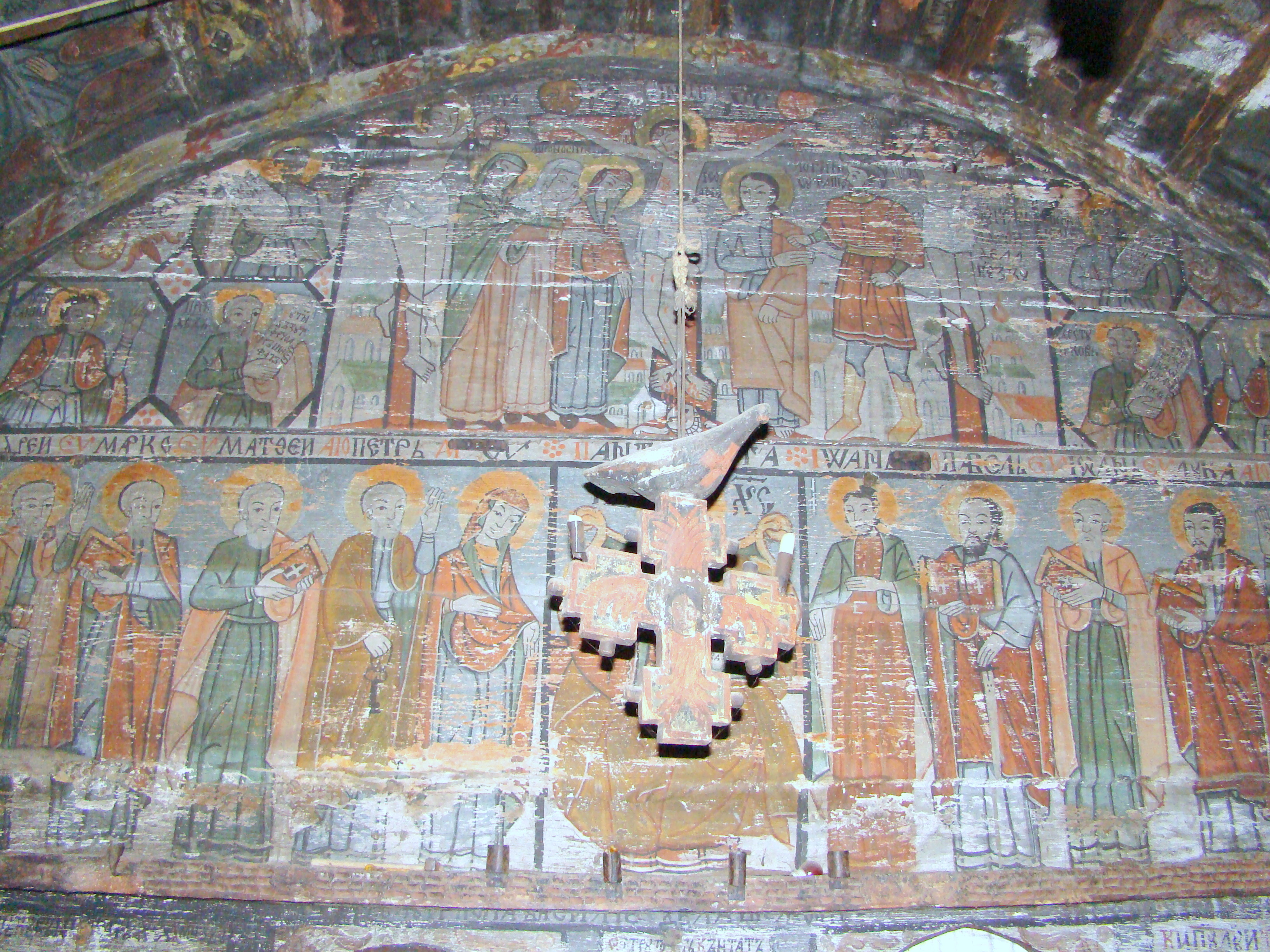 Biserica din lemn „Sf. Arhg. Mihail și Gavriil”